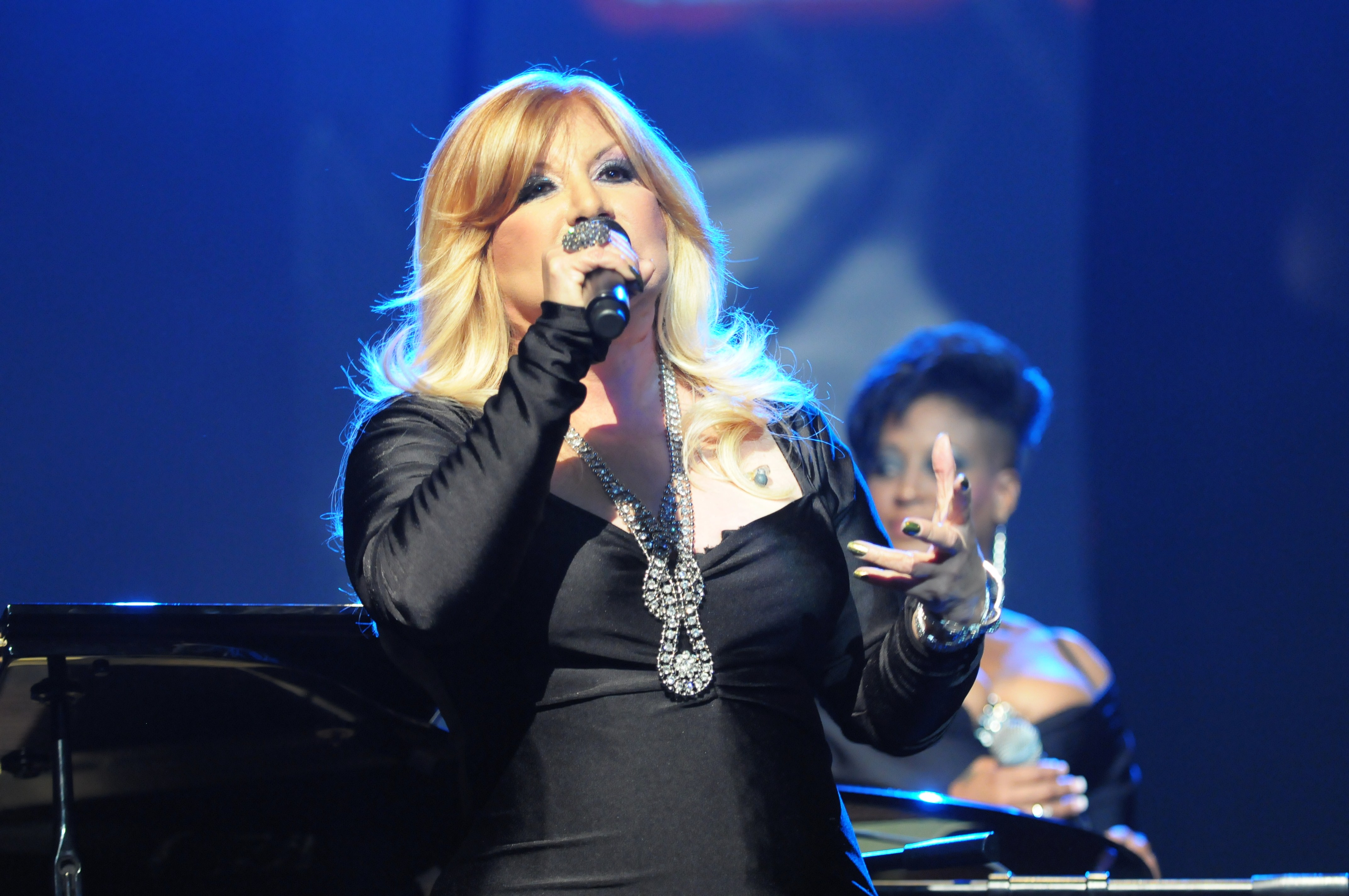 Tomada el 10/11/2012 en el Teatro Miami-Dade Conuty Auditoriu. USA en el Grandes Divas cantan a LAs Diego.